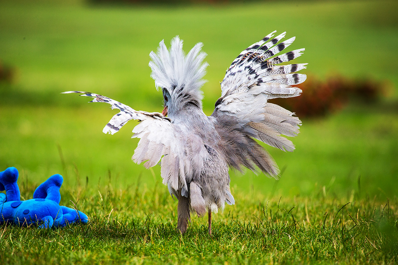 Erschrockener Kagu im Vogelpark Walsrode